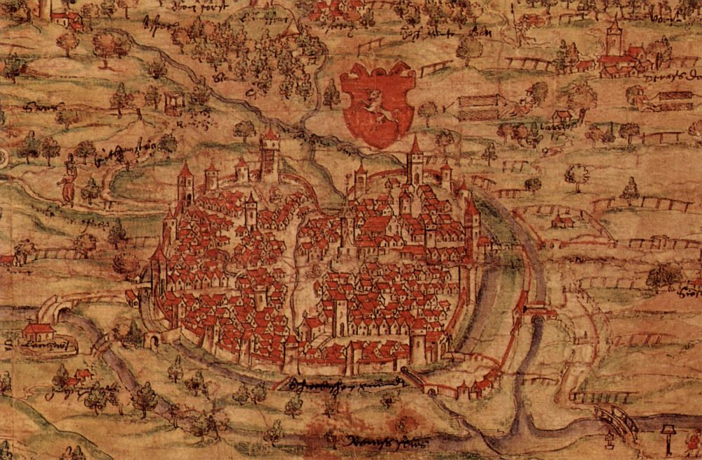 Ausschnitt aus der Karte der Freipirsch von Schwäbisch Gmünd, Städtisches Museum Schwäbisch Gmünd